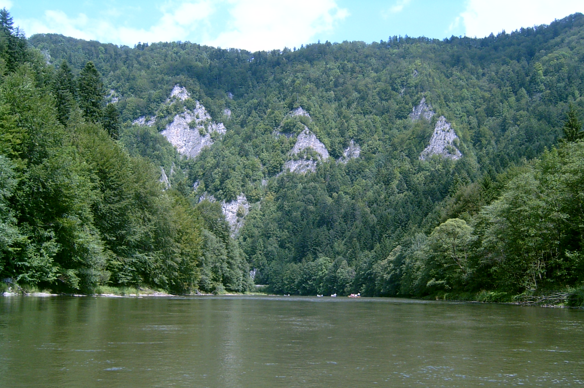 Pieniny, Poland